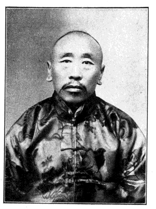 中文（台灣）: 中華民國國會議員